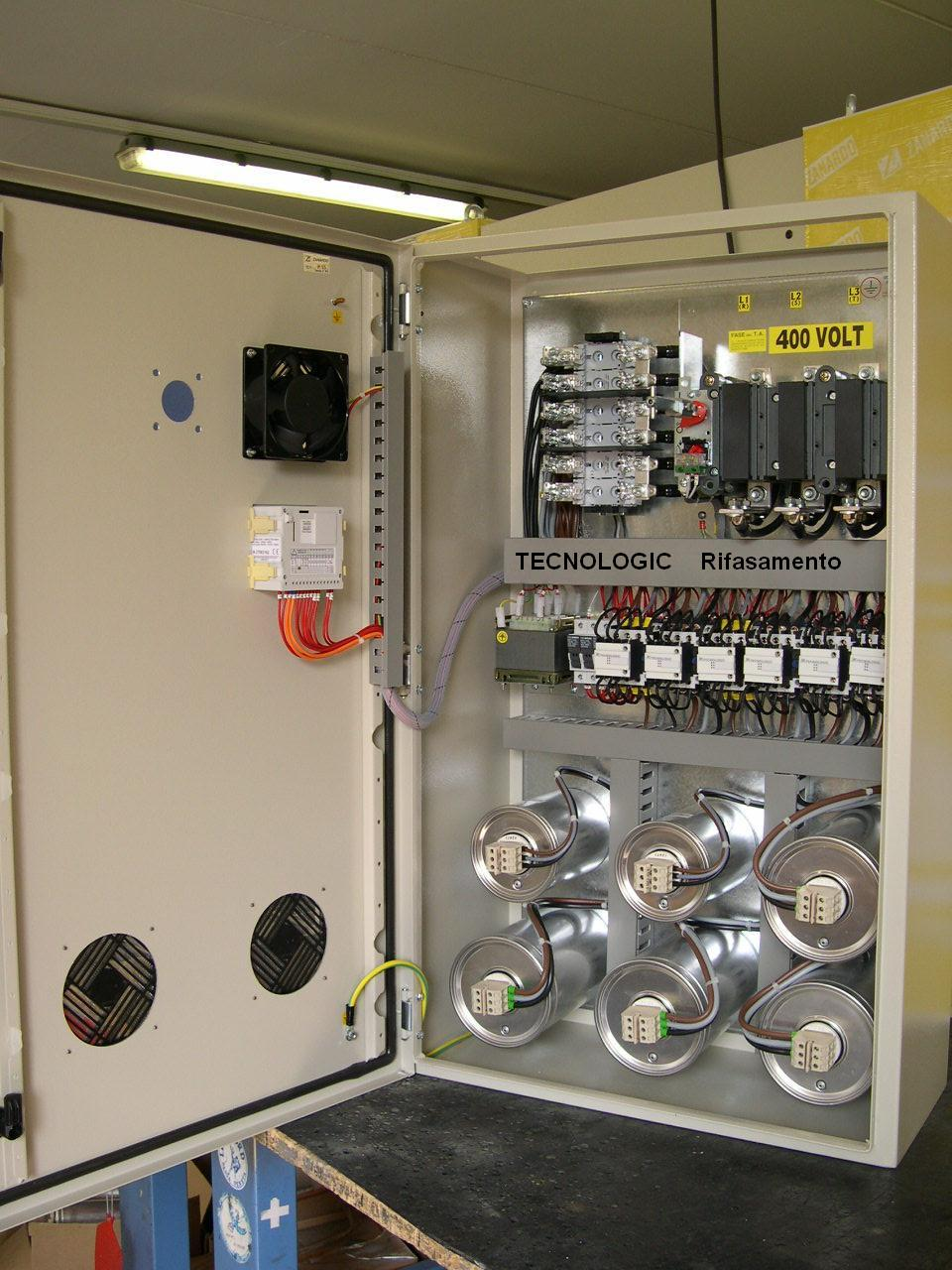 Quadro di rifasamento Automatico- Power factor correction